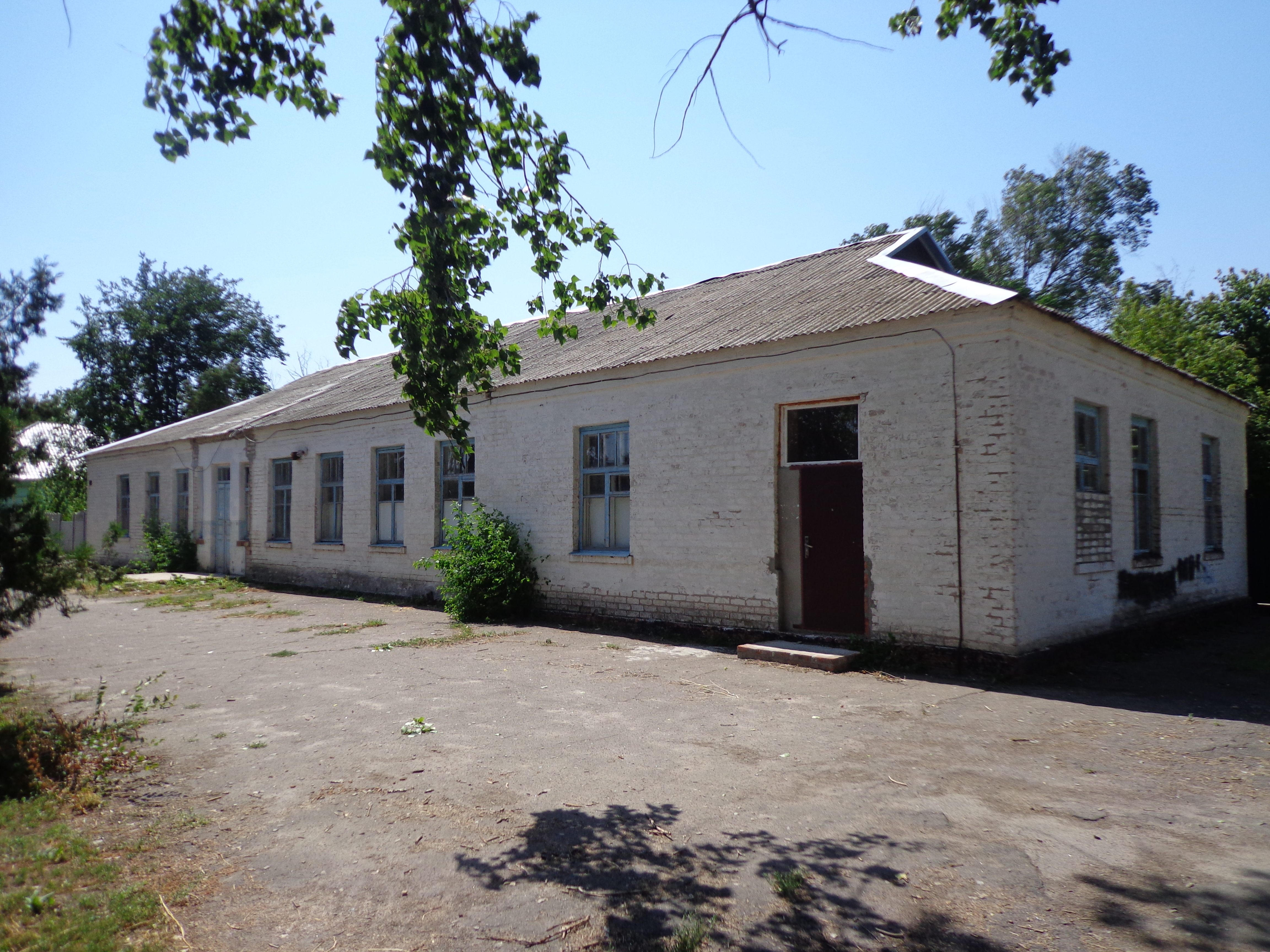 Заброшенное здание (вероятно, бригада) в центре колхоза им. Фрунзе. Село Константиновка, Мелитопольский район, Запорожская область, Украина.